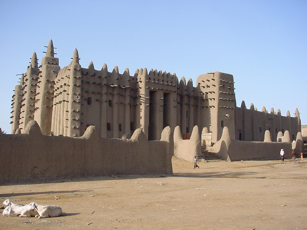 Great Mosque of Djenné